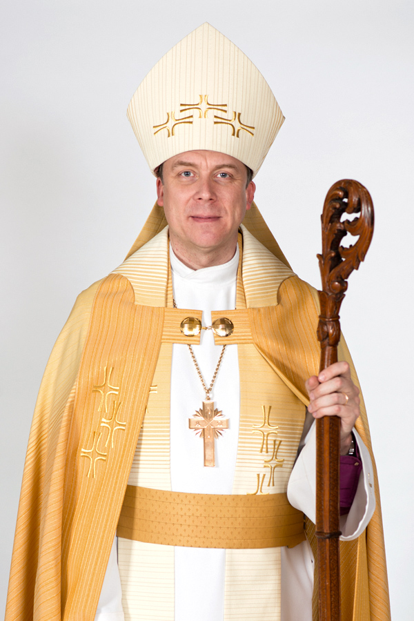 Peapiiskop Urmas Viilma piiskopi ametitunnuste: mitra, piiskopisau ja peapiiskopi ristiga.